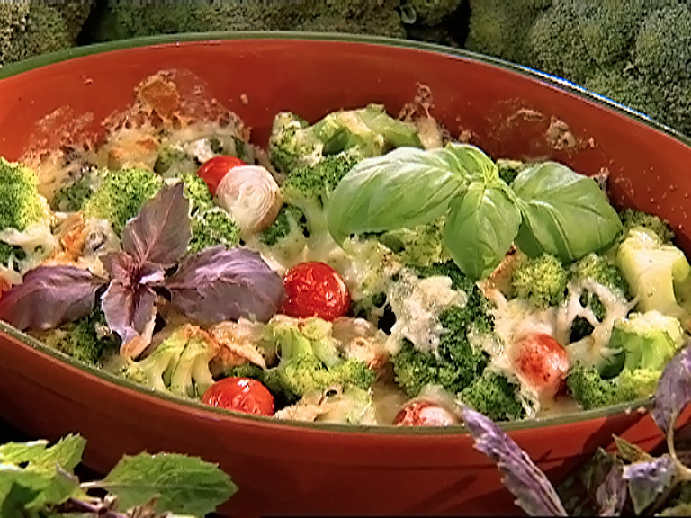 Brokkoli-Käse-Rezept